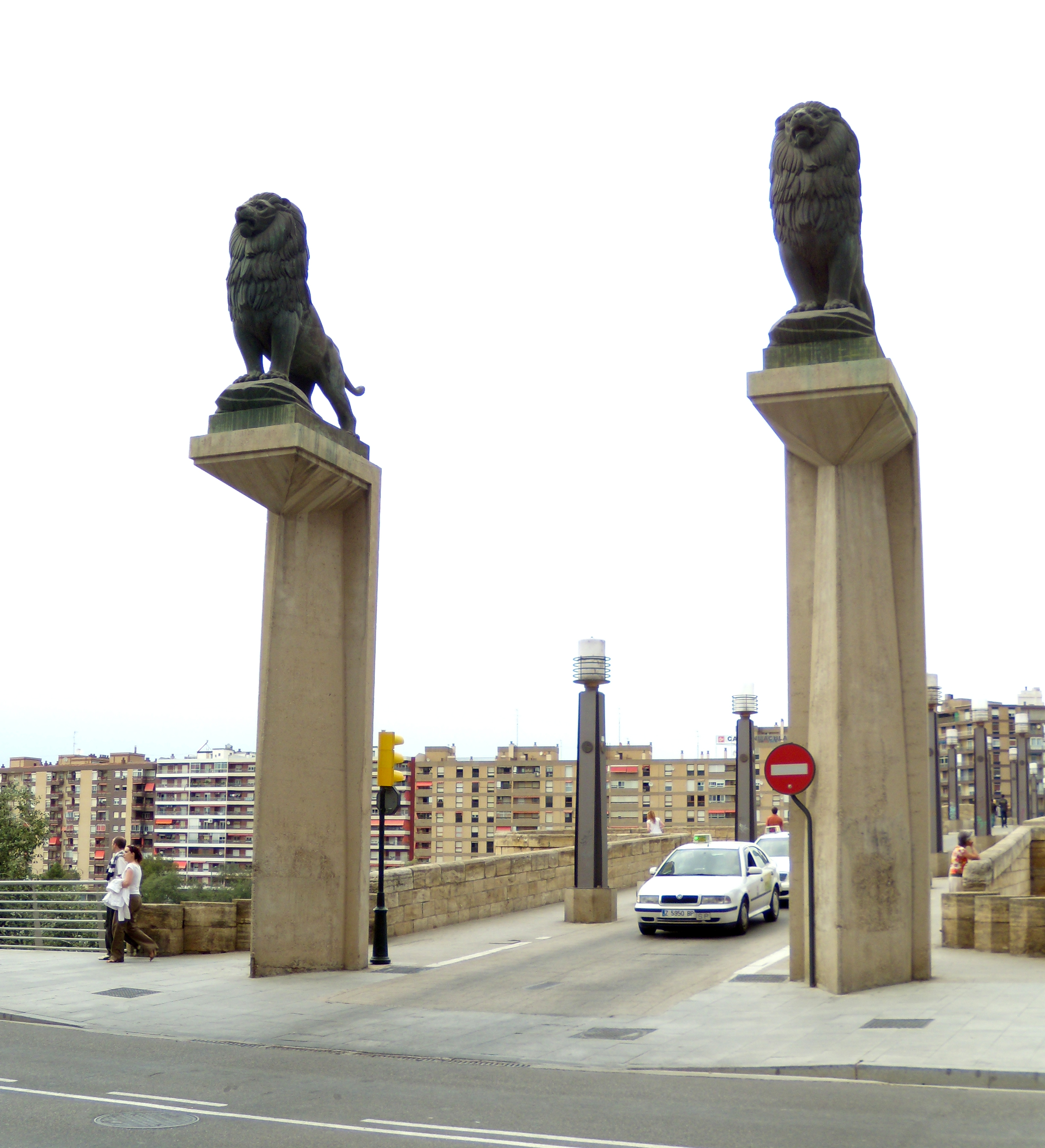 Los leos del Puente de Piedra de Zaragoza